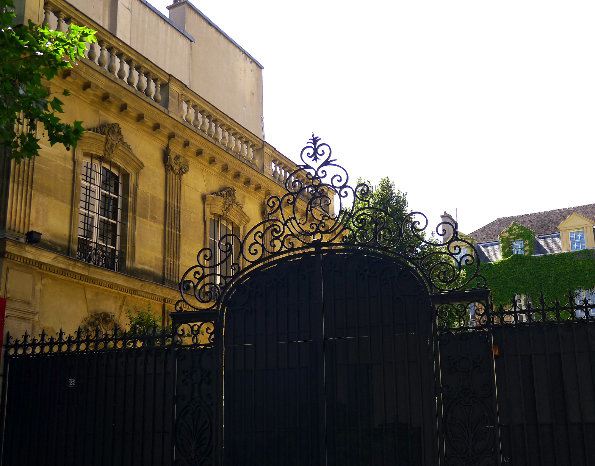 Hôtel de Sagonne vu depuis le boulevard Beaumarchais (n°23) - Paris IV .